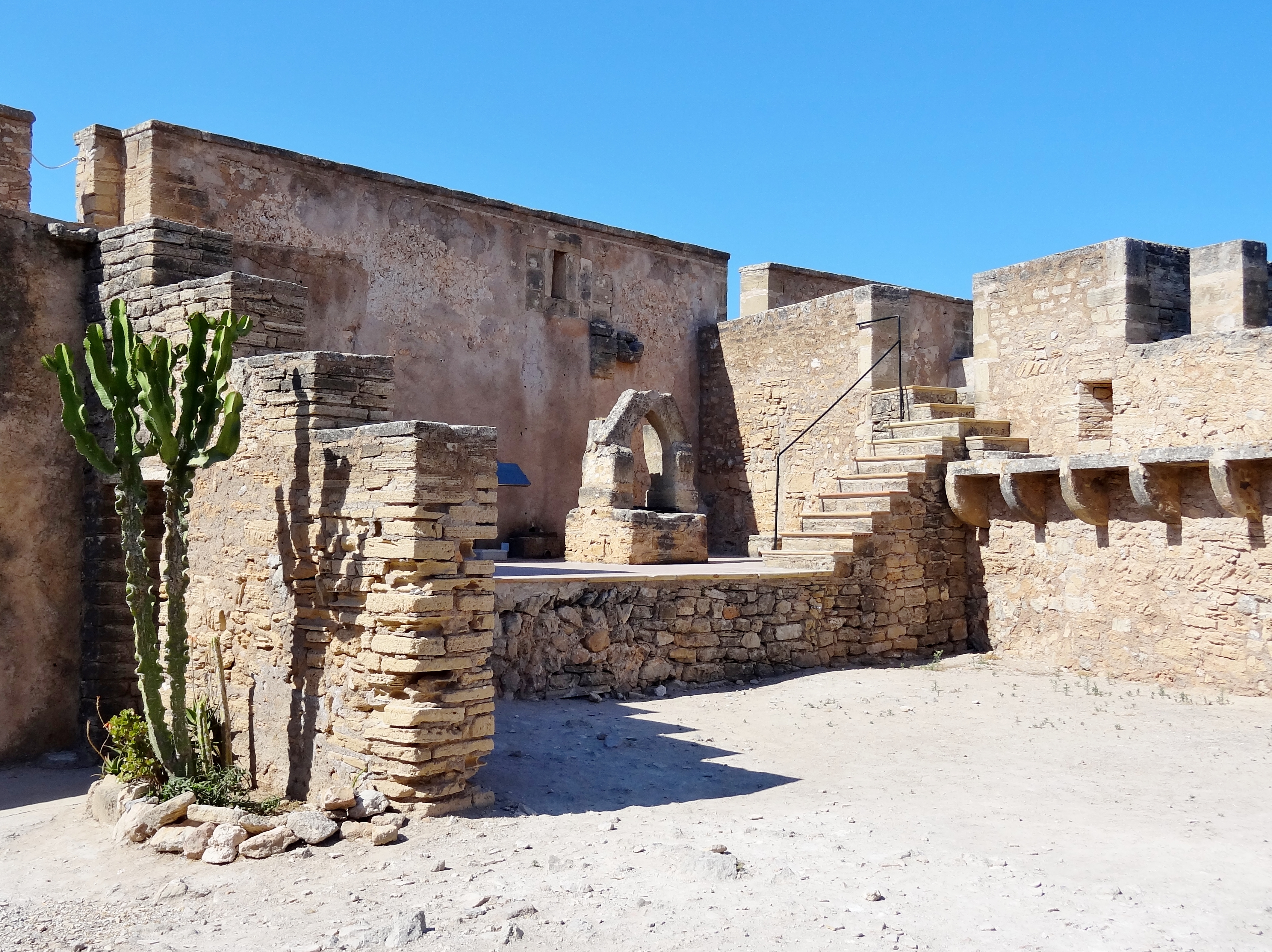 Castell de Capdepera, Gemeinde Capdepera, Mallorca, Spanien